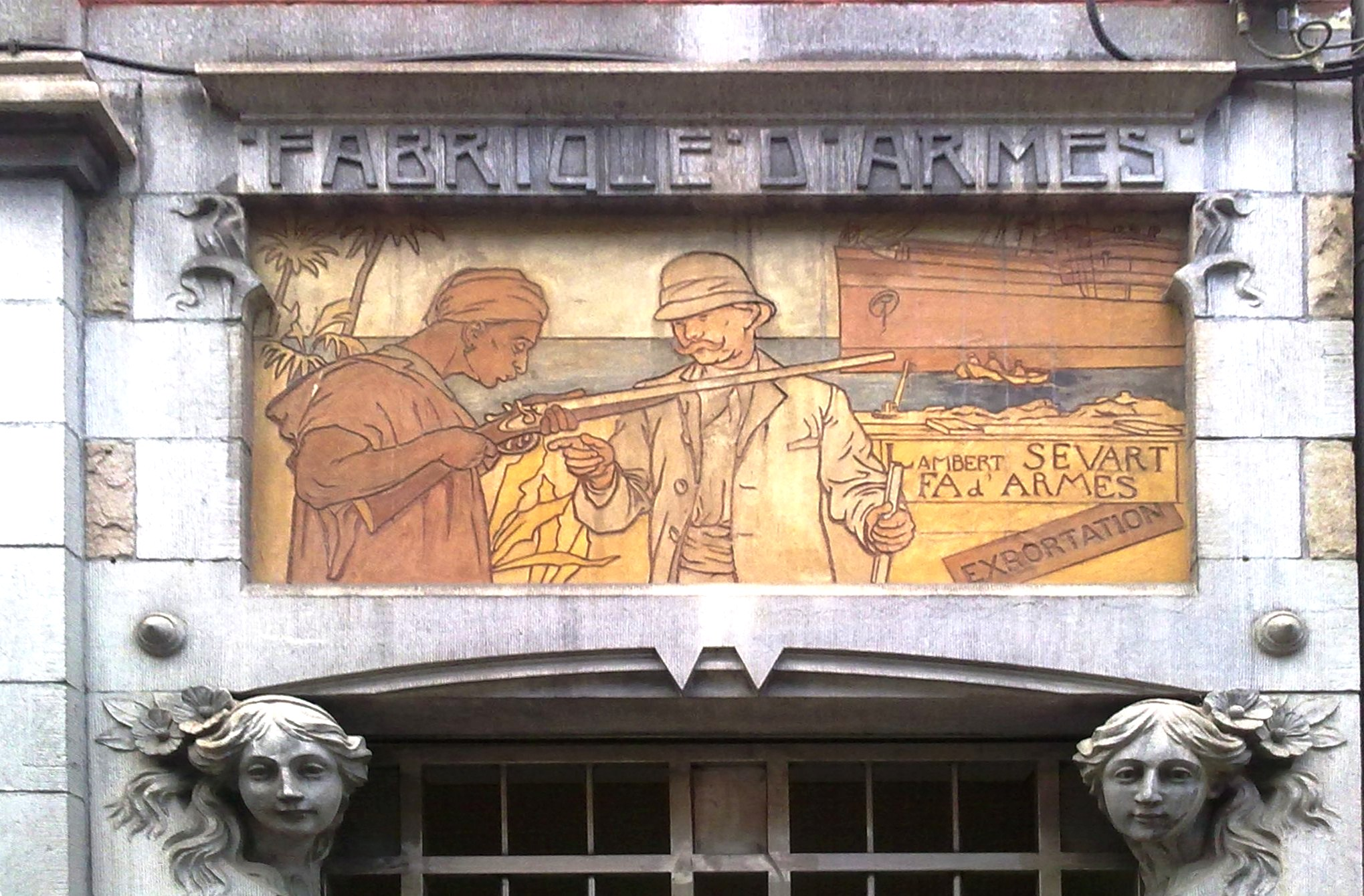 Sgraffite du Marchand d'armes Lambert SEVART à Liège, rue Grangagnage, 16.